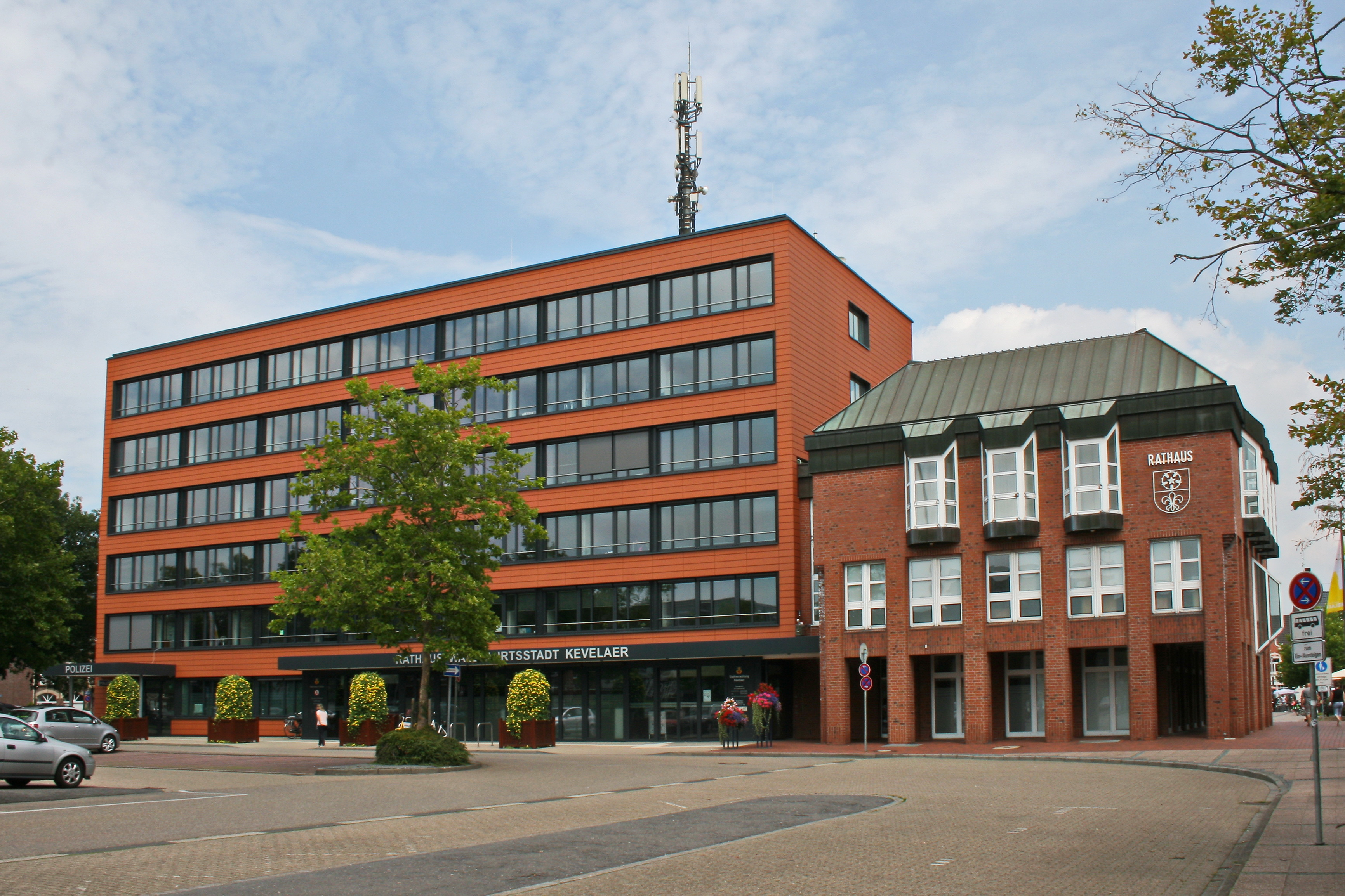 Rathaus in Kevelaer, Peter-Plümpe-Platz 12.